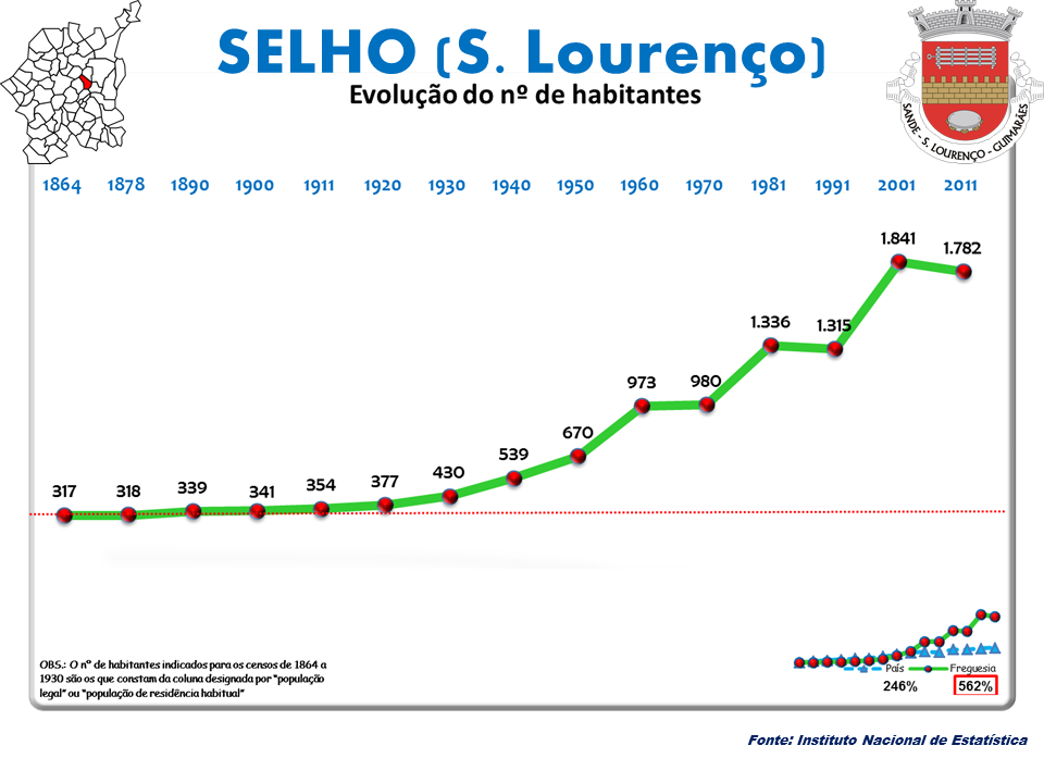 Censo 2011